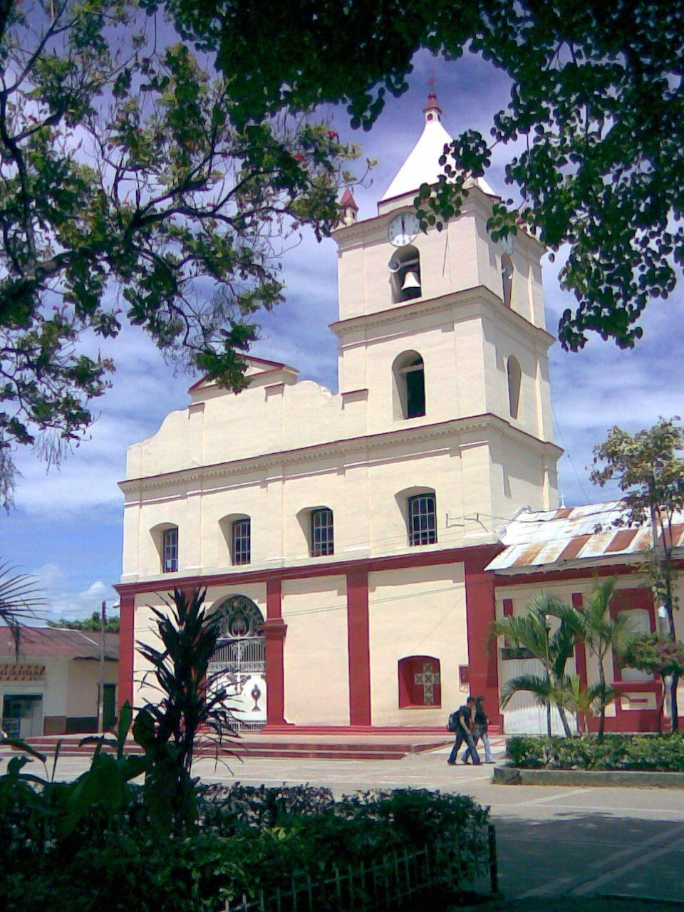 Iglesia Nuestra Señora de la Natividad, Natagaima Tolima